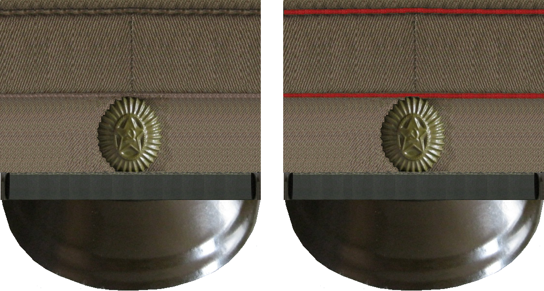 ФУРАЖКА ПОЛЕВАЯ